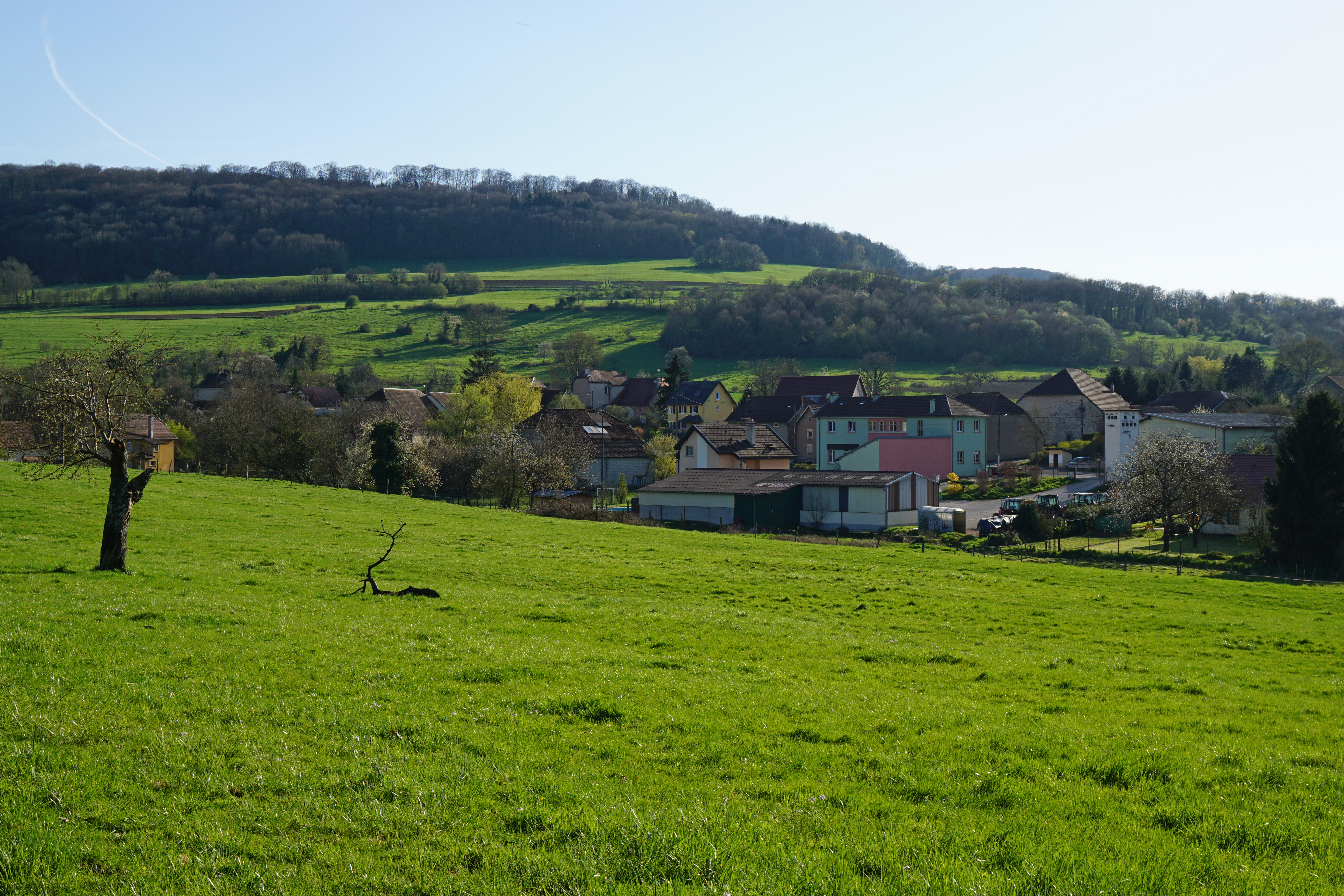 Vue générale de Gémonval.